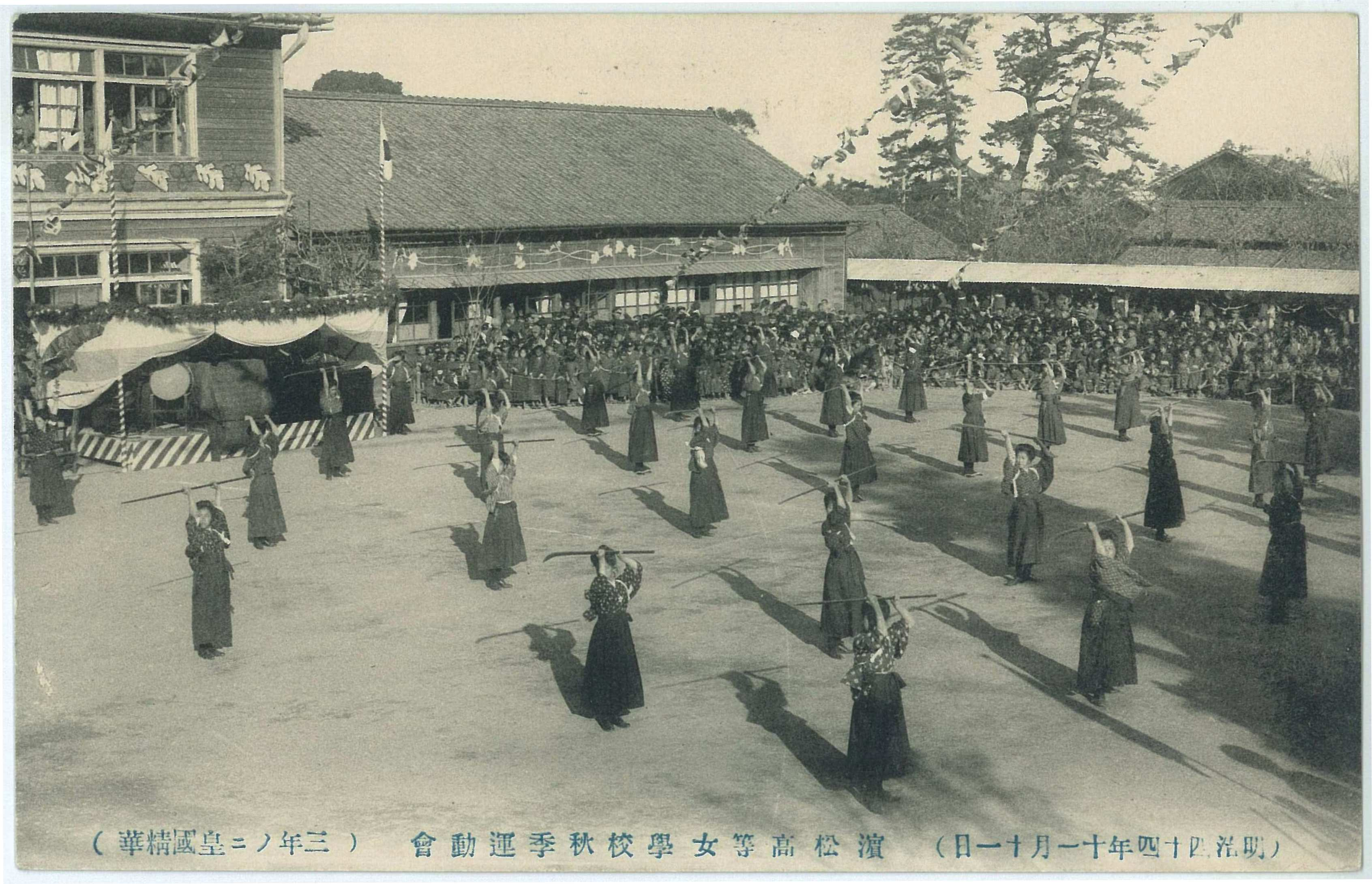 （明治四十四年十一月十一日）濱松高等女學校秋季運動會（三年ノ二皇國精華） 静岡縣濱松町 松代馬冷 浜松市立浜松高等女学校（現・浜松市立高等学校）秋季運動会 3年・皇国精華（なぎなた演武）